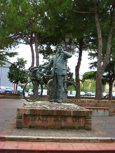 Photo d'une statue d'un chiffonnier ou "Staccivendolo" au centre de Gambettola